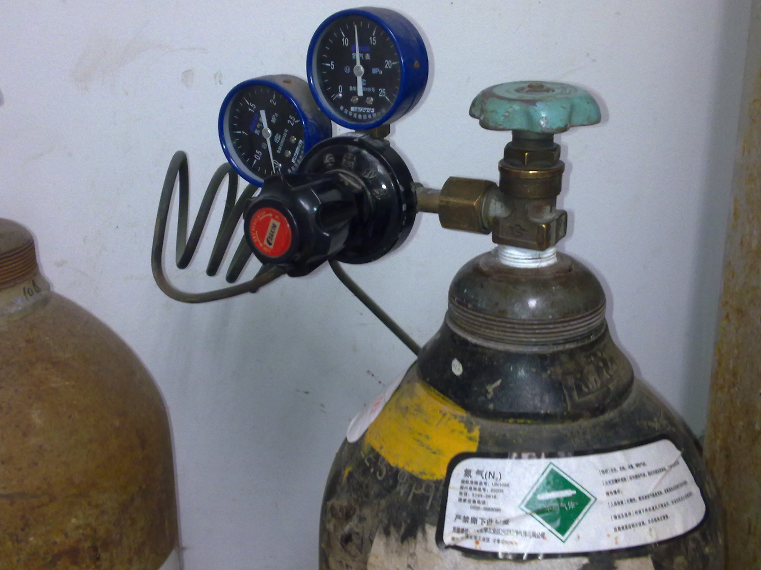 一个配有减压阀的高纯氮气钢瓶